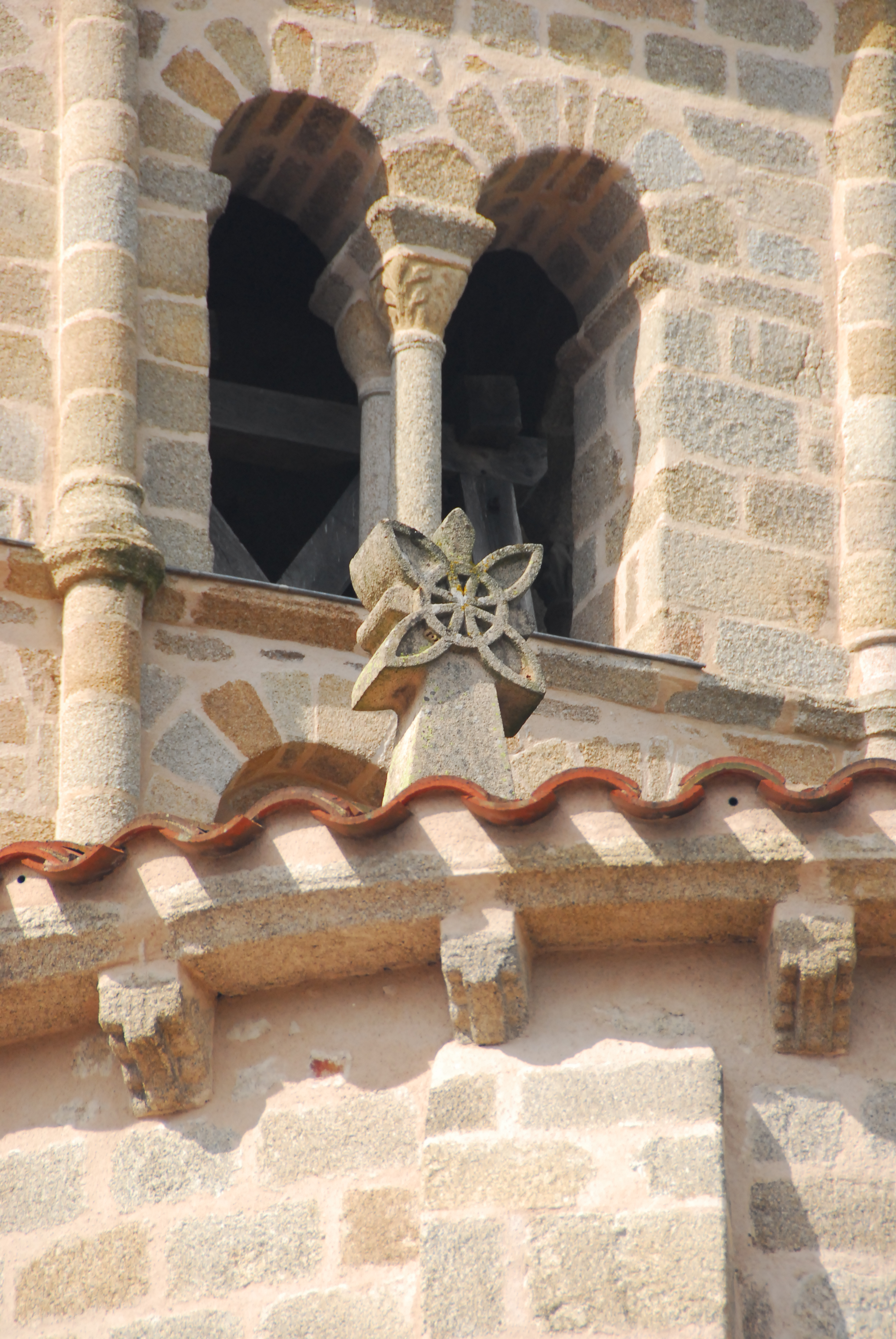 N.-D. de Châtel-Montagne, Detail Chorgiebelfirst